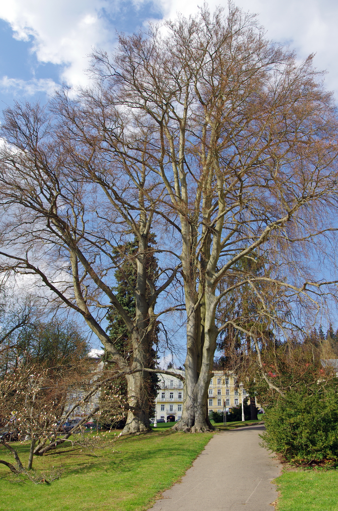 Památné stromy Buky u kostela Nanebevzetí Panny Marie, Mariánské Lázně, okres Cheb